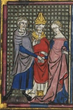 Mariage de Bohémond Ier et Constance de France